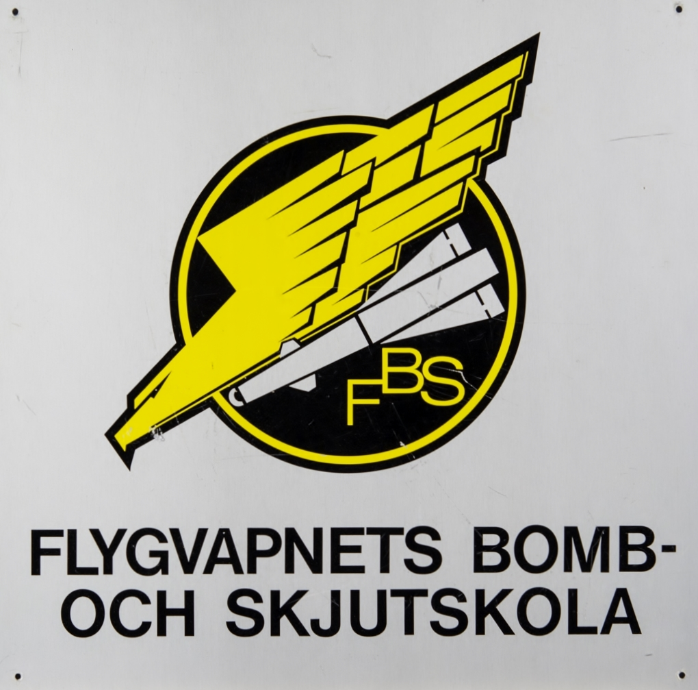 Tavla med Flygvapnets bomb- och skjutskolas (FBS) emblem. Motiv: robotbeväpnad örn, som symboliserar utbildning och ny vapenteknik. Just detta divisionsemblem är från år 1982, dock tillkom det under 1960-talet.